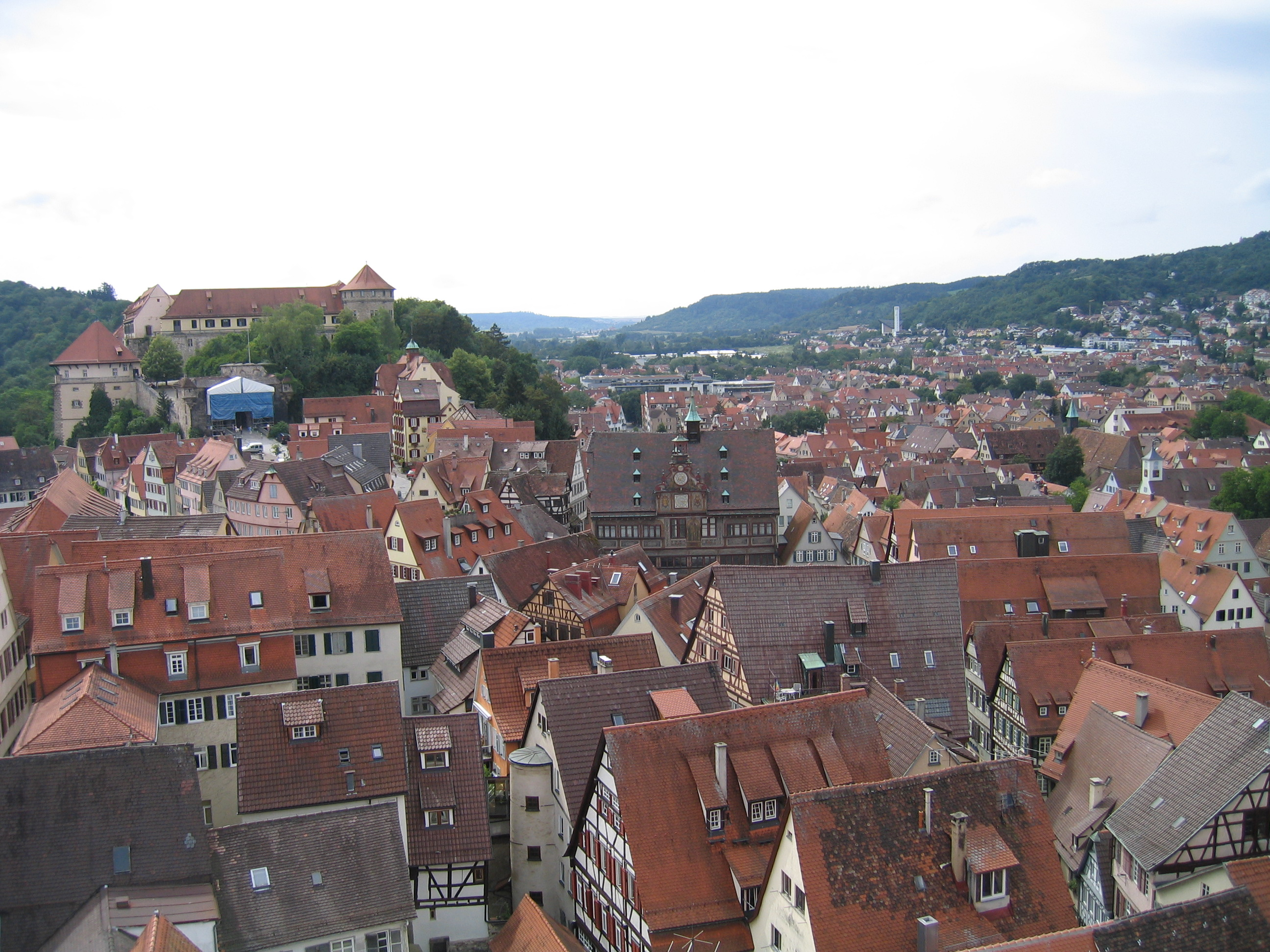 Tübingen Altstadt